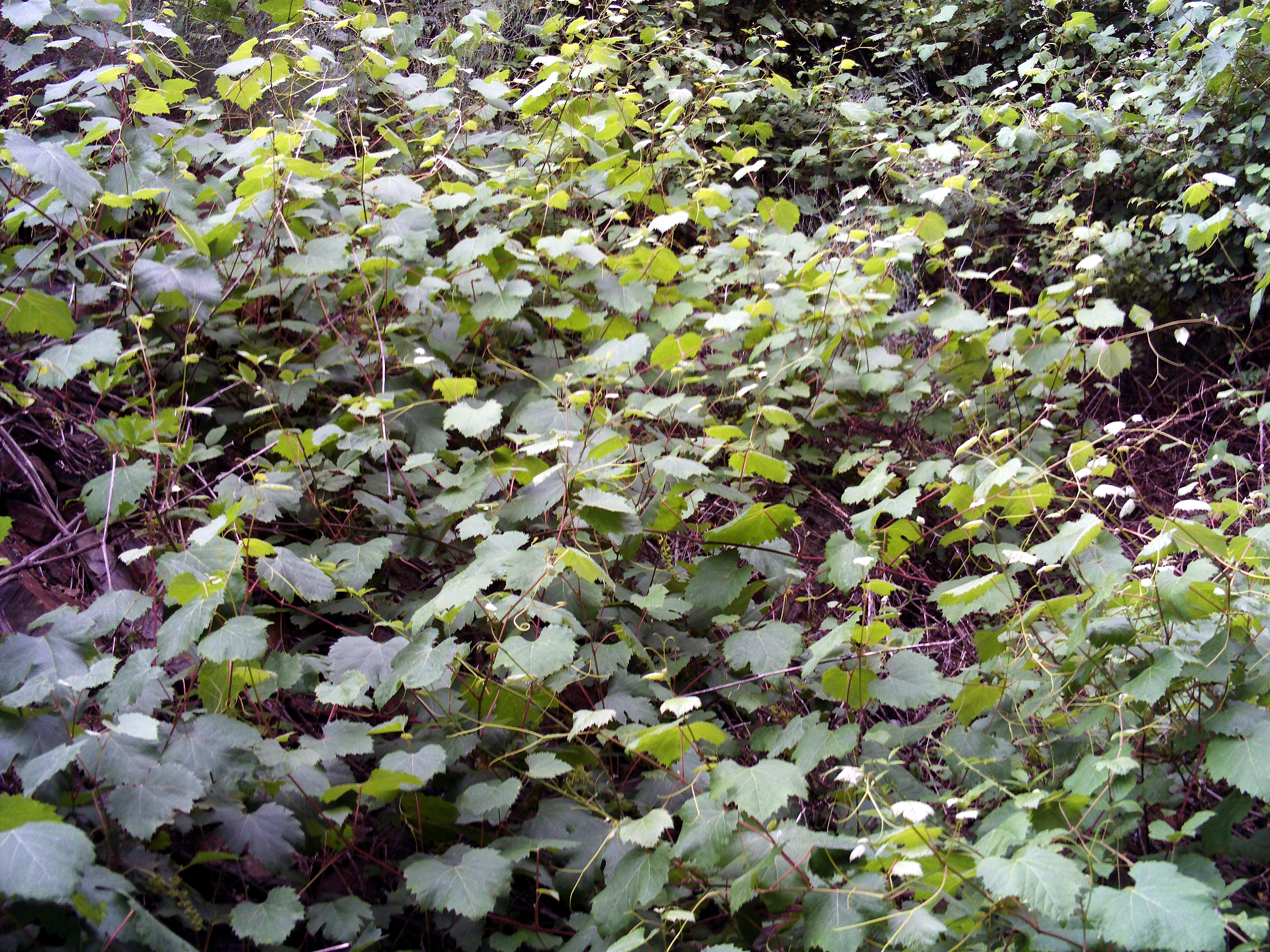 Vitis vinifera var. sylvestris Habitus Sierra Madrona